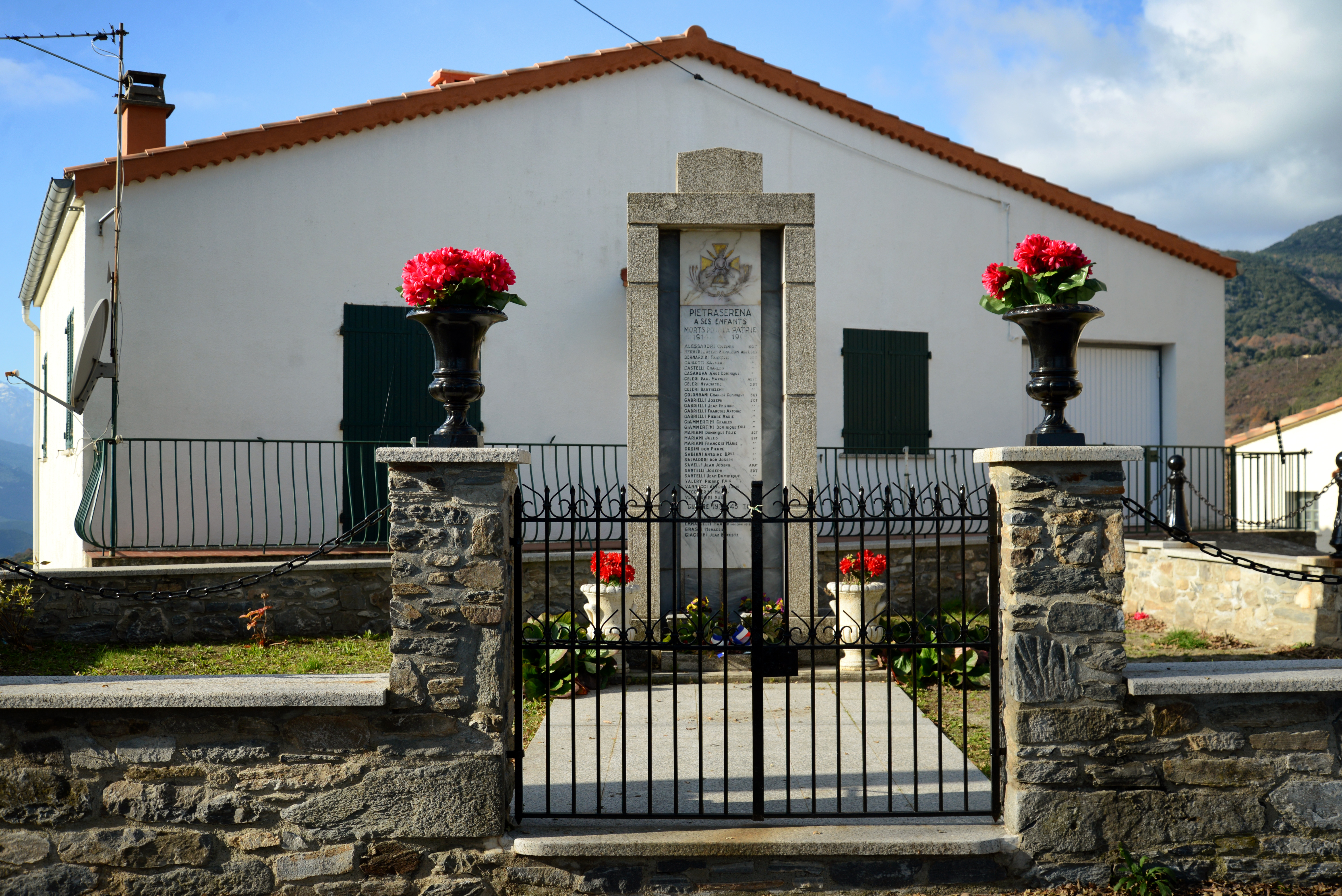 Pietraserena, Rogna (Corse) - Monument aux morts